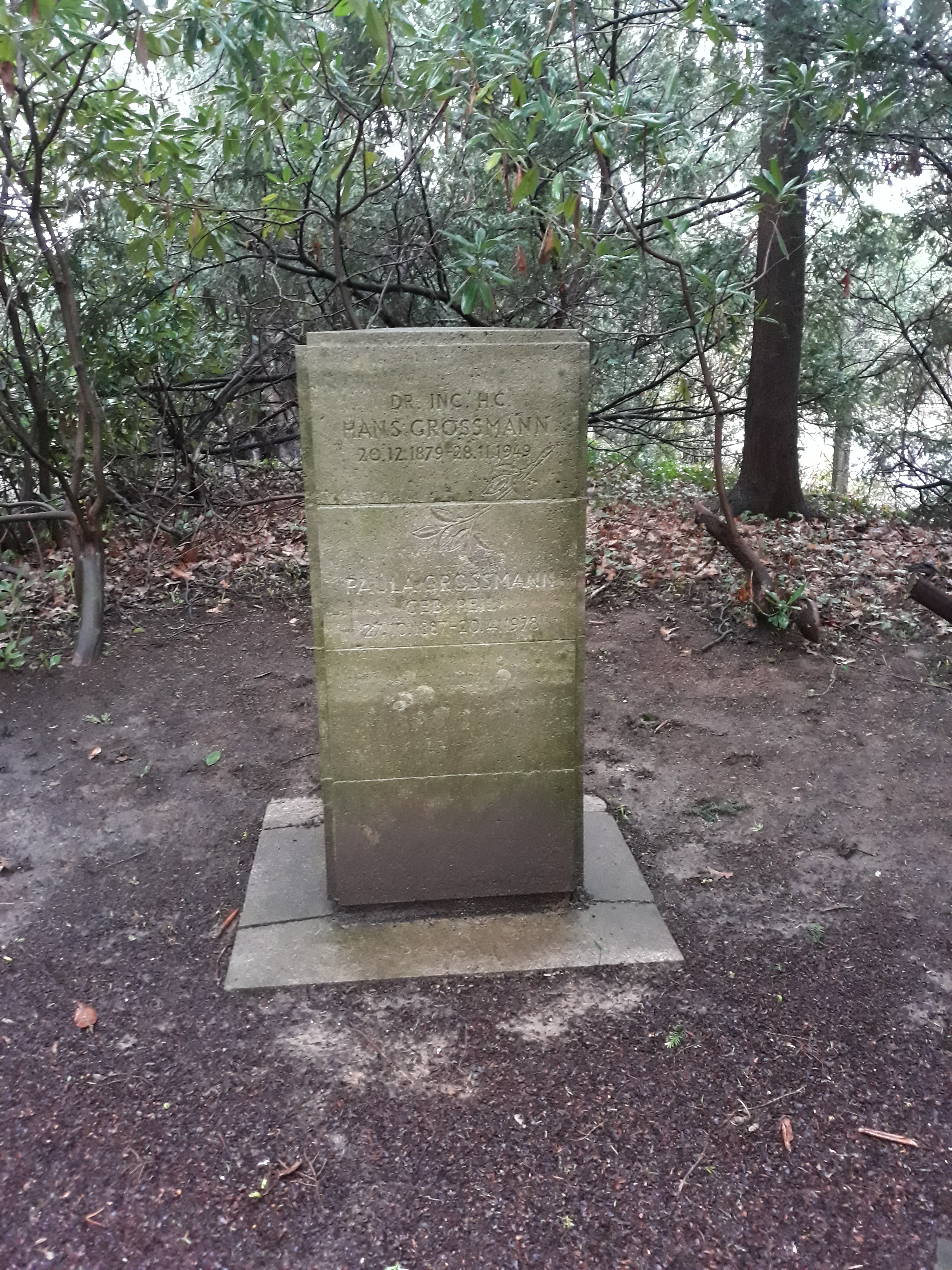 Das Grab des deutschen Architekten Hans Grossmann auf dem Hauptfriedhof Mülheim an der Ruhr.